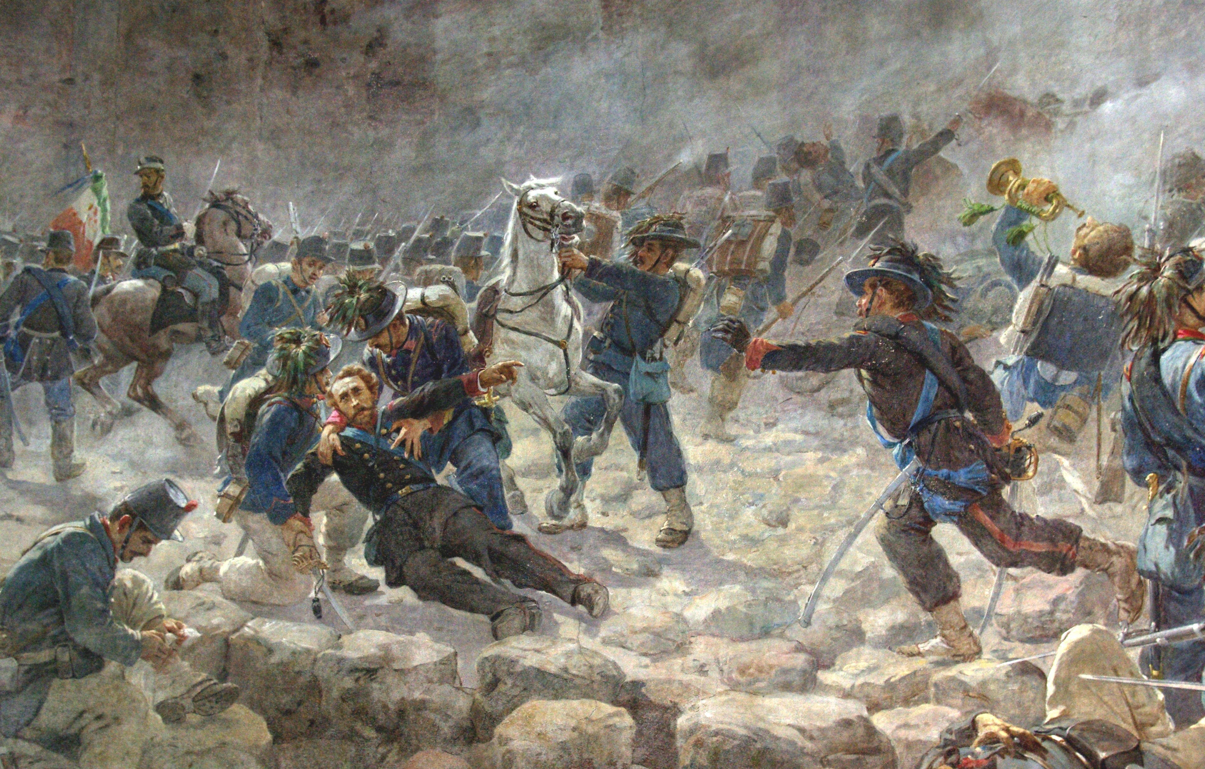 Ausschnitt eines Freskos im Turm von San Martino della Battaglia